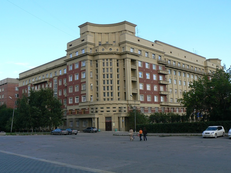 Стоквартирный дом в Новосибирске